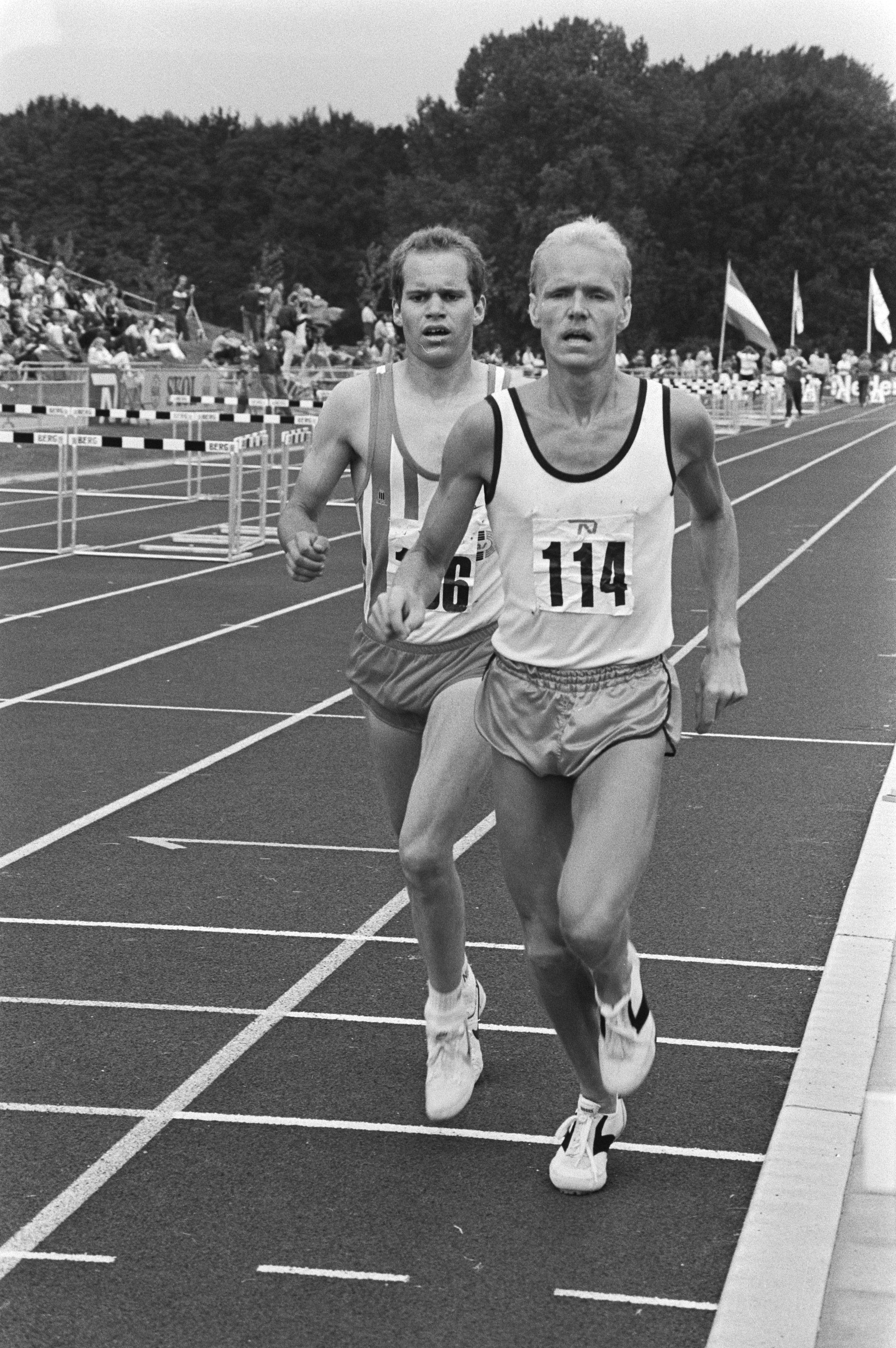 Collectie / Archief : Fotocollectie Anefo Reportage / Serie : Nederlandse kampioenschappen atletiek te Utrecht Beschrijving : Winnaar 5000m, Klaas Lok, in aktie; achter hem Cor Lambrechts Datum : 8 augustus 1981 Locatie : Utrecht (provincie), Utrecht (stad) Trefwoorden : atleten, hardlopen, wedstrijden Persoonsnaam : Lambrechts, Cor, Lok, Klaas Fotograaf : Croes, Rob C. / Anefo Auteursrechthebbende : Nationaal Archief Materiaalsoort : Negatief (zwart/wit) Nummer archiefinventaris : bekijk toegang 2.24.01.05 Bestanddeelnummer : 931-6177